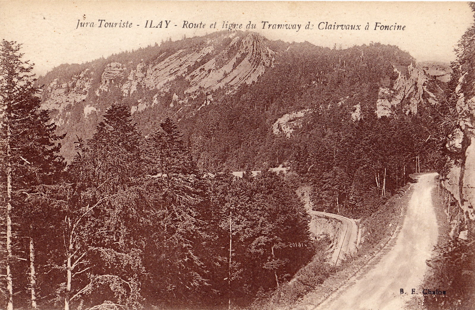 Carte postale ancienne éditée par B. F à Chalon-sur-Saône, collection Jura Touriste : ILAY - Route et ligne du tramway de Clairvaux à Foncine.